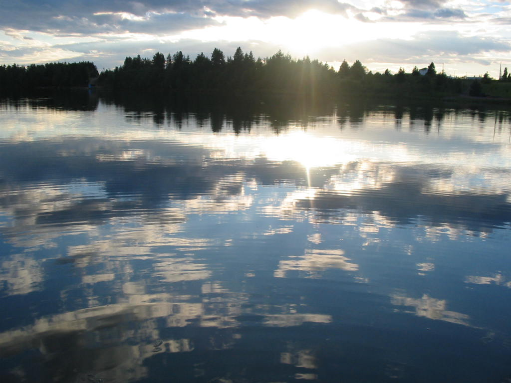 Photo que j'ai prise moi-même sur la rivière Pokemouche pendant l'été 2006